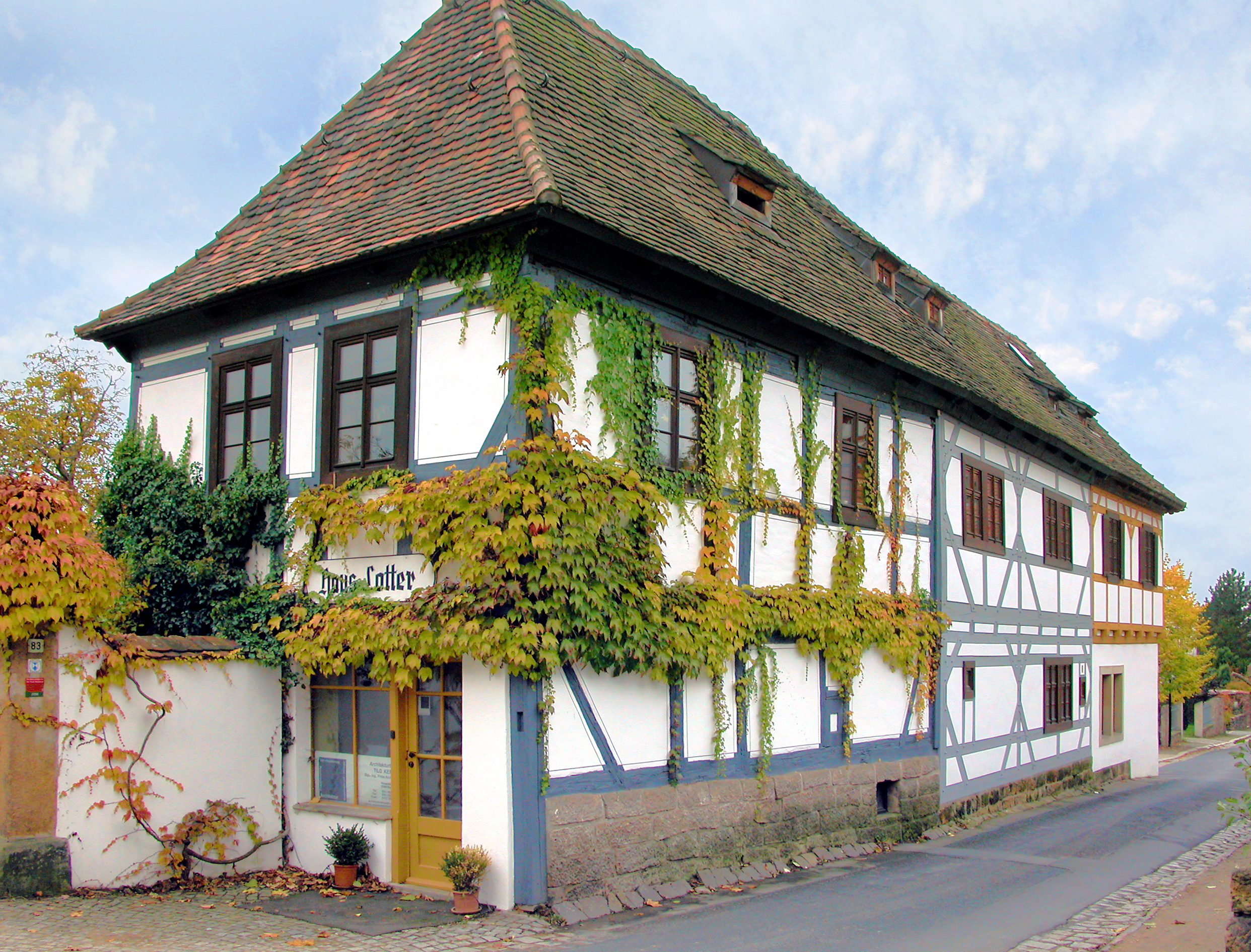 28.10.2009 01445 Radebeul, Winzerstraße 83 (GMP: 51.112519,13.630315: Haus Lotter, ehemaliges Weingut. [DSCN39646.TIF]20091028130DR.JPG(c)Blobelt